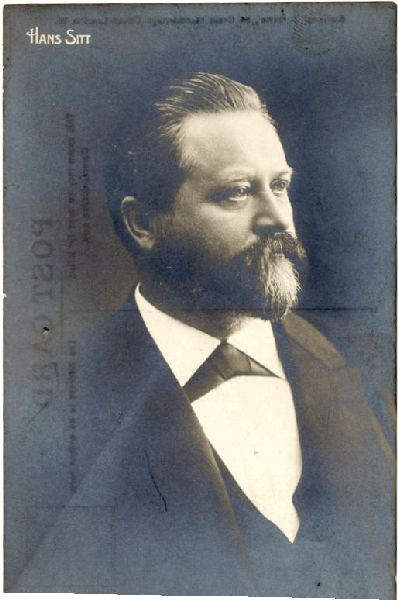 Fotografie von Hans Sitt